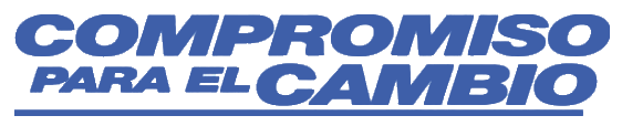 Símbolo de Compromiso para el cambio, agrupación política argentina